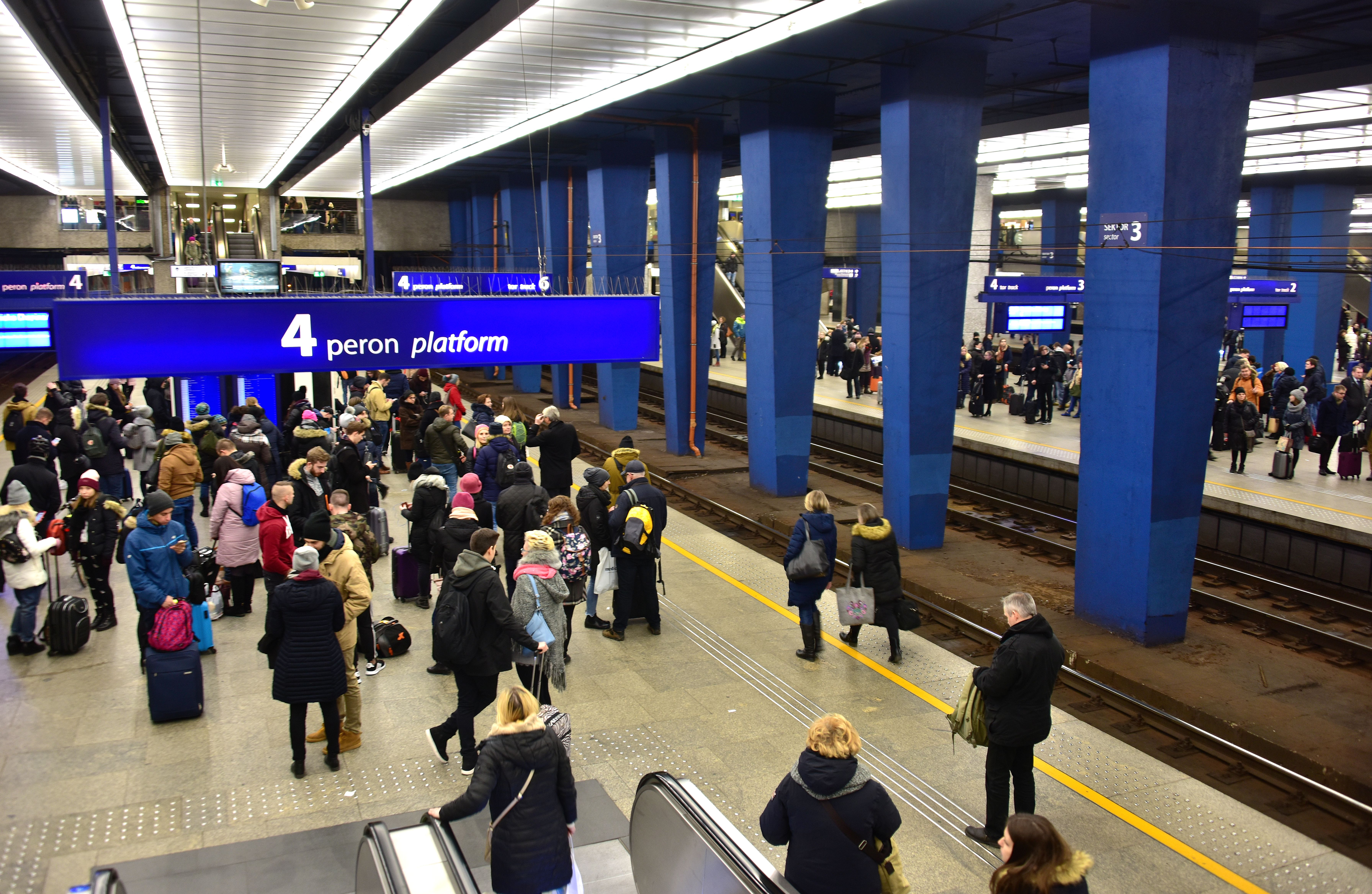 Pasażerowie na peronie 4 dworca Warszawa Centralna w Warszawie